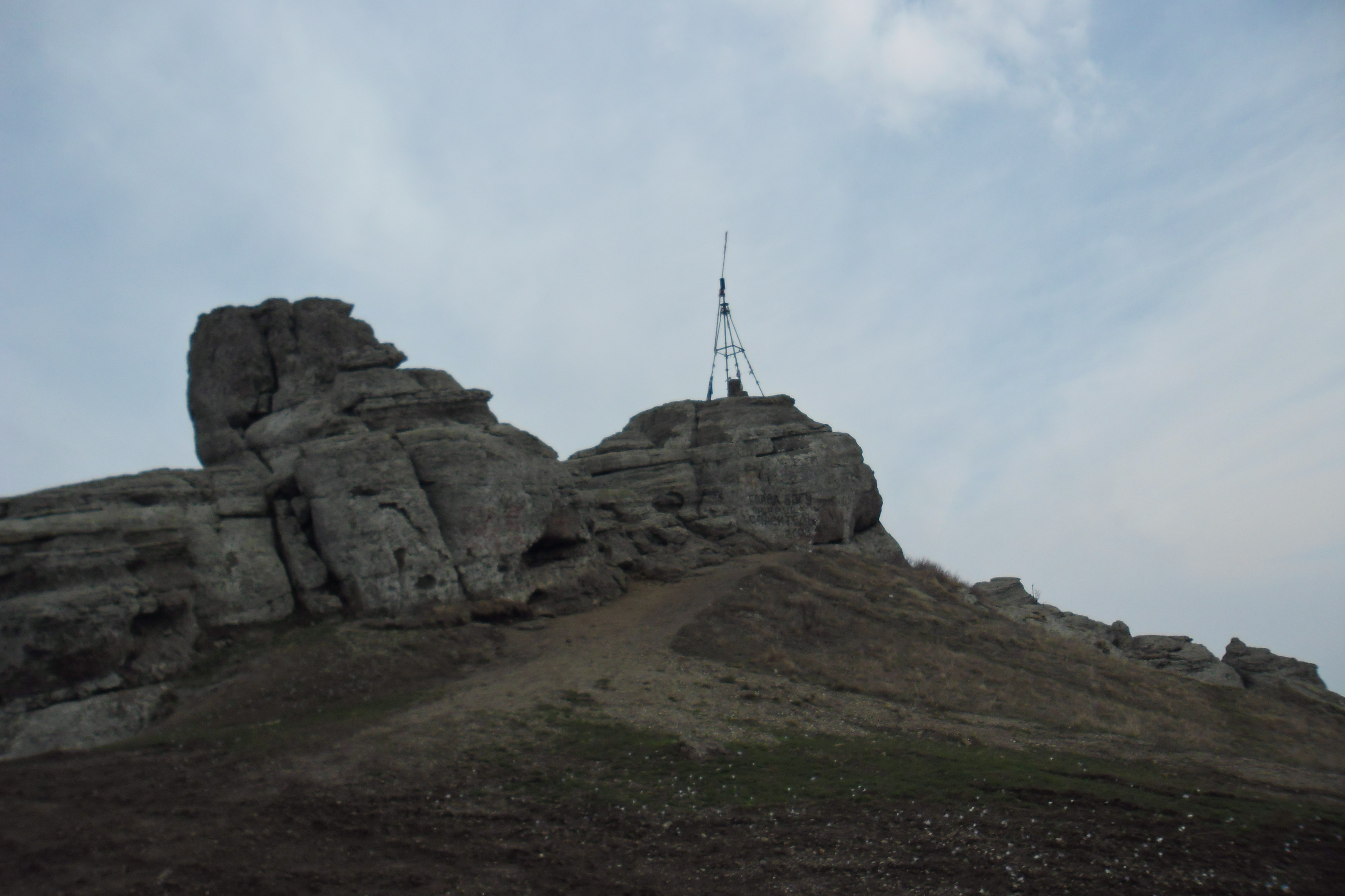 Південна_Демерджи: Фото